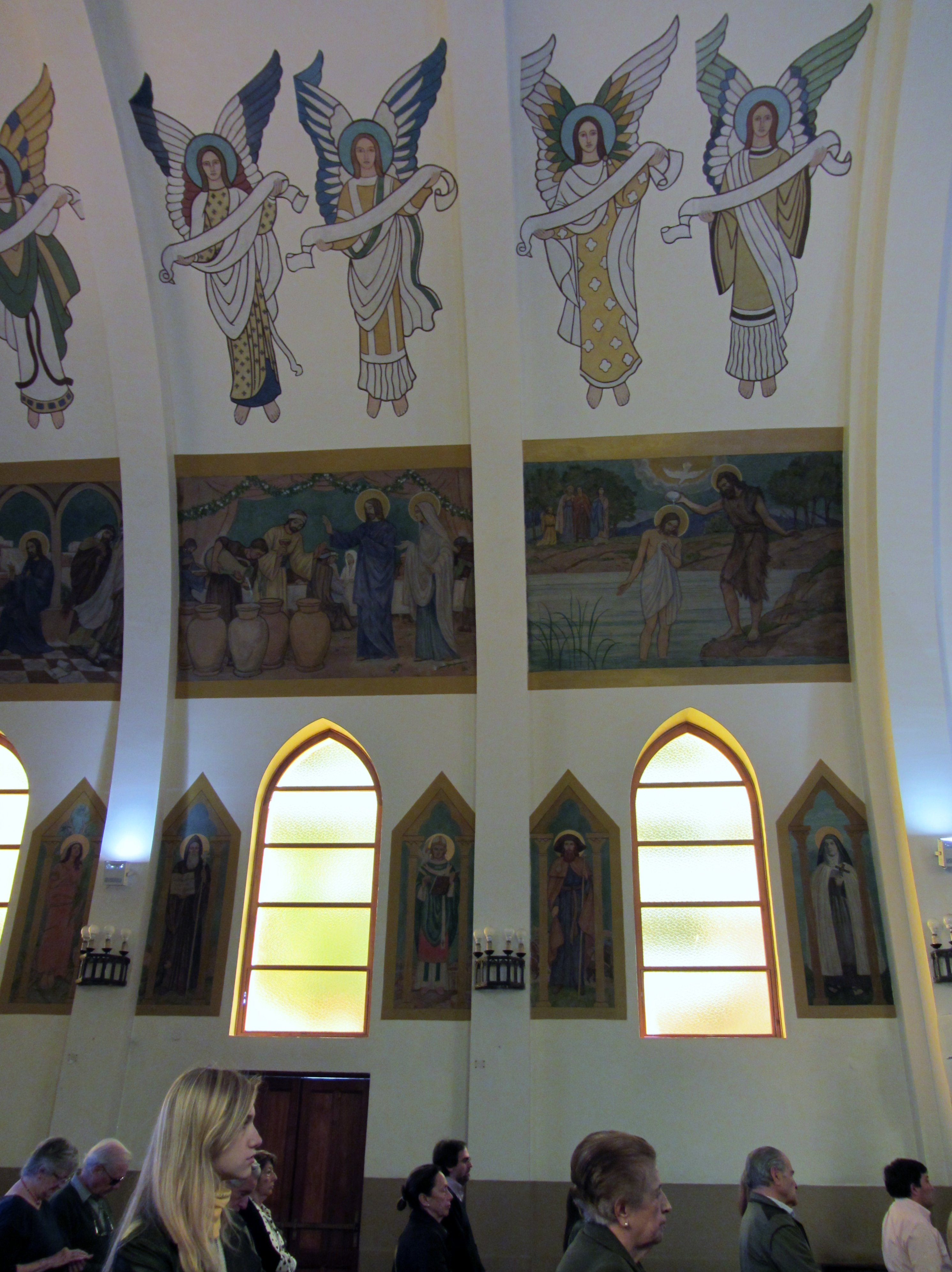 Misa en la Iglesia de Nuestra Señora de los Ángeles en el barrio El Golf